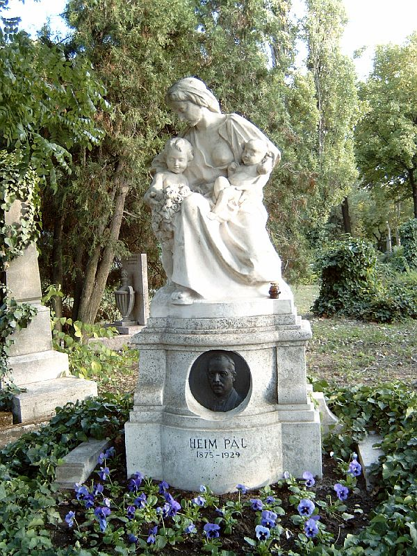 Heim Pál sírja Budapesten. ifj. Vastagh György (1868–1946) alkotása. Kerepesi temető: 36/2-1-26.